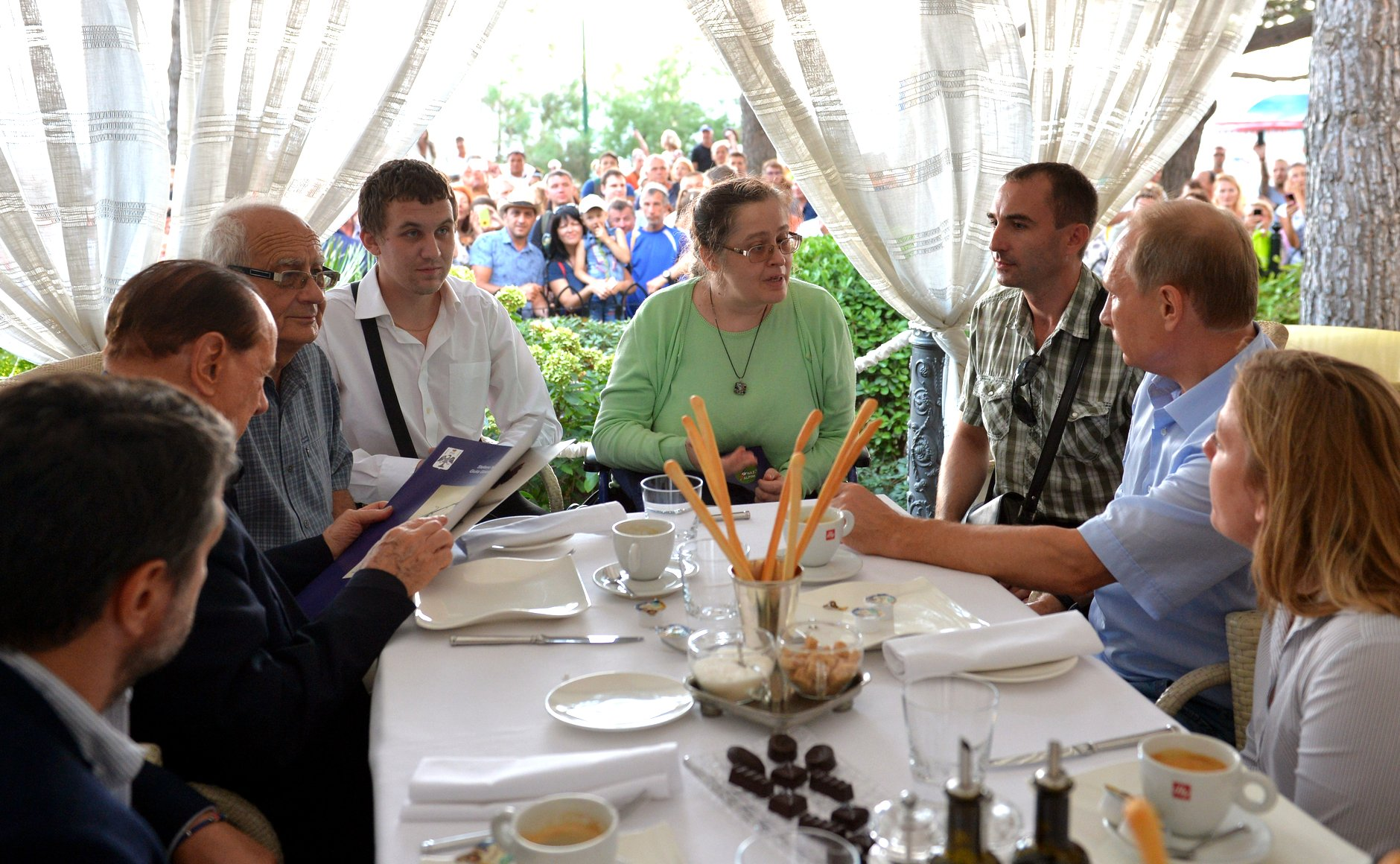 Владимир Путин встретился в Крыму с Сильвио Берлускони, находящимся в России с частным визитом